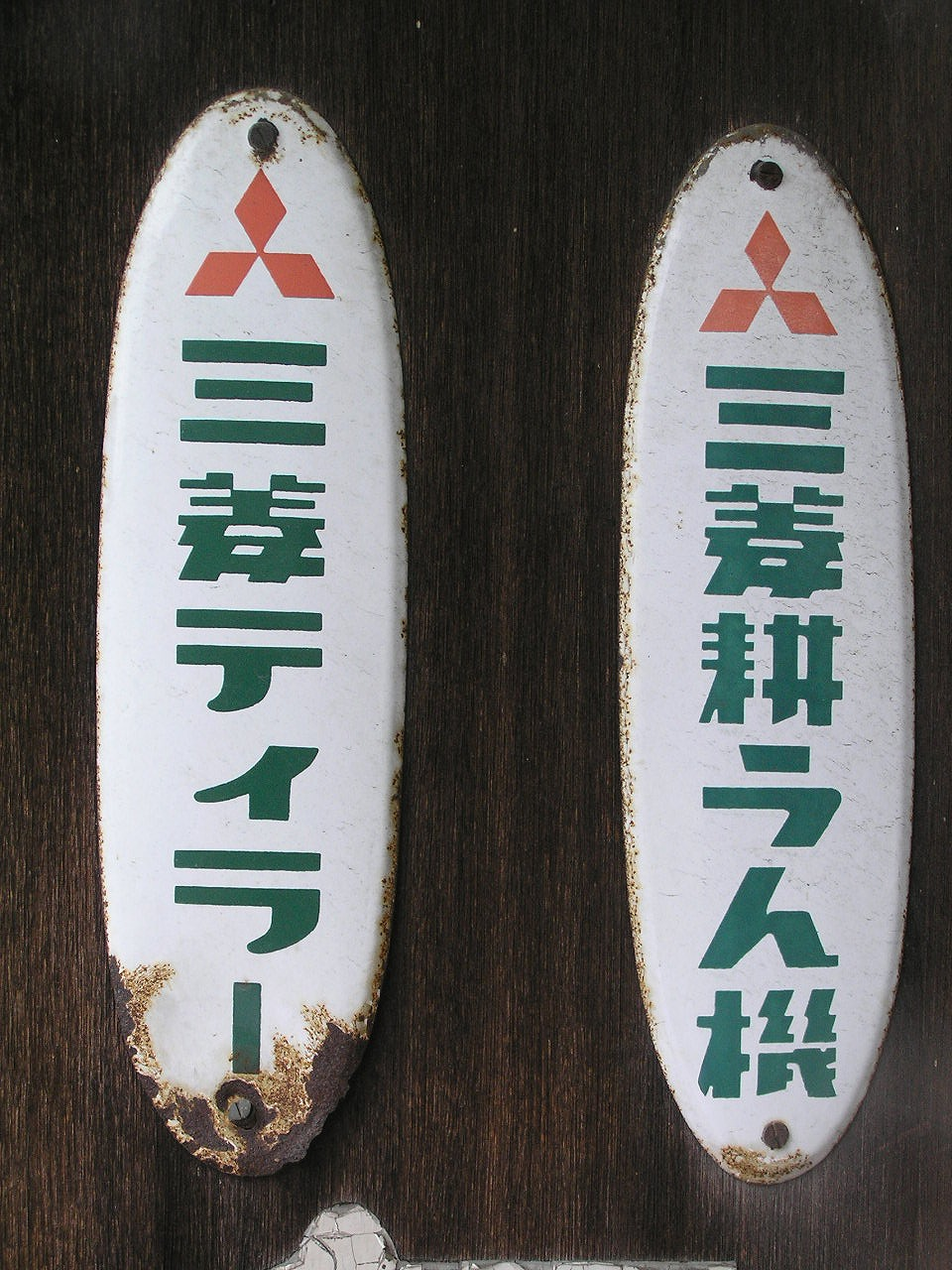 三菱耕運機看板（柏原町）